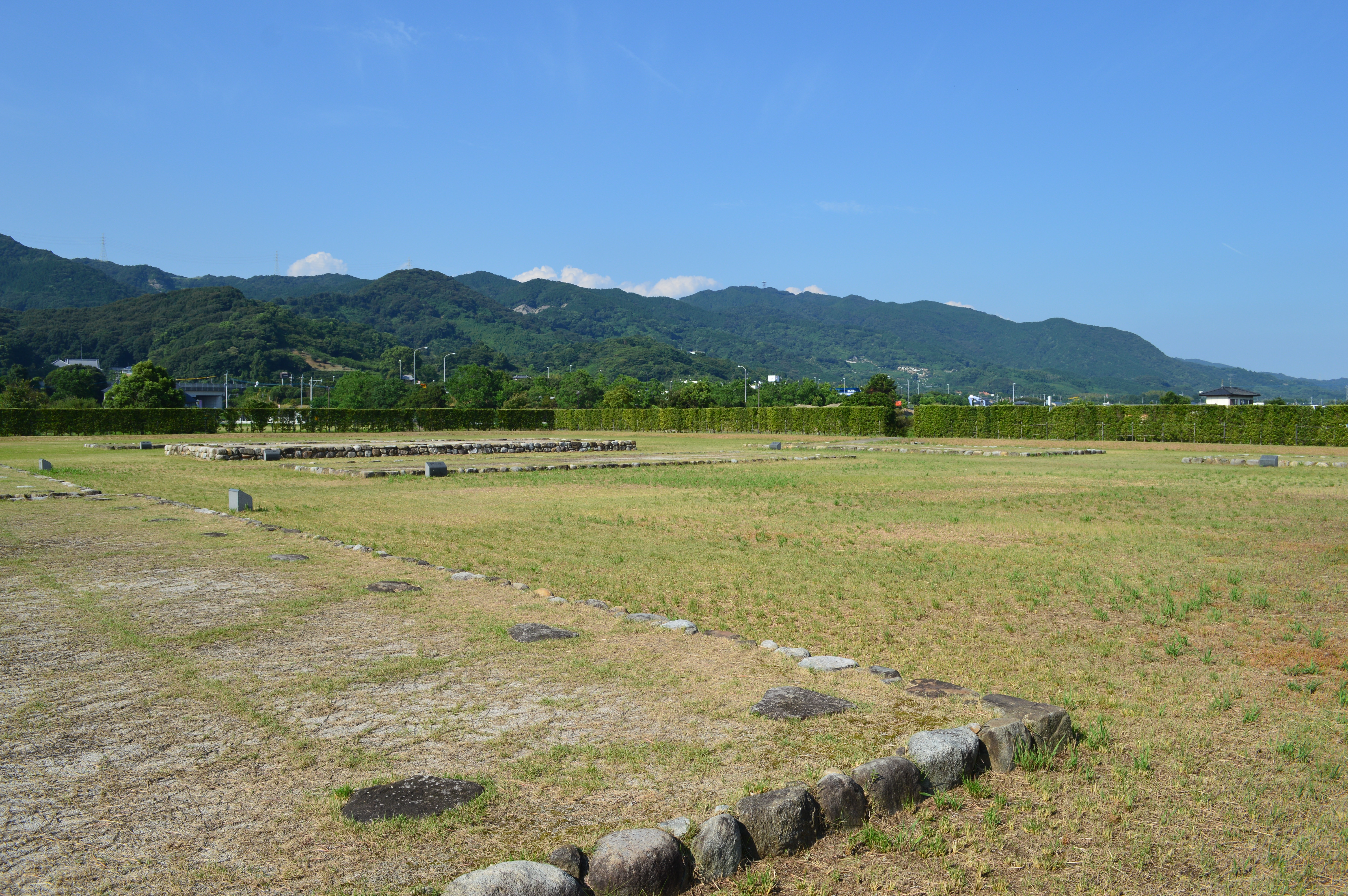 肥前国庁跡 全景